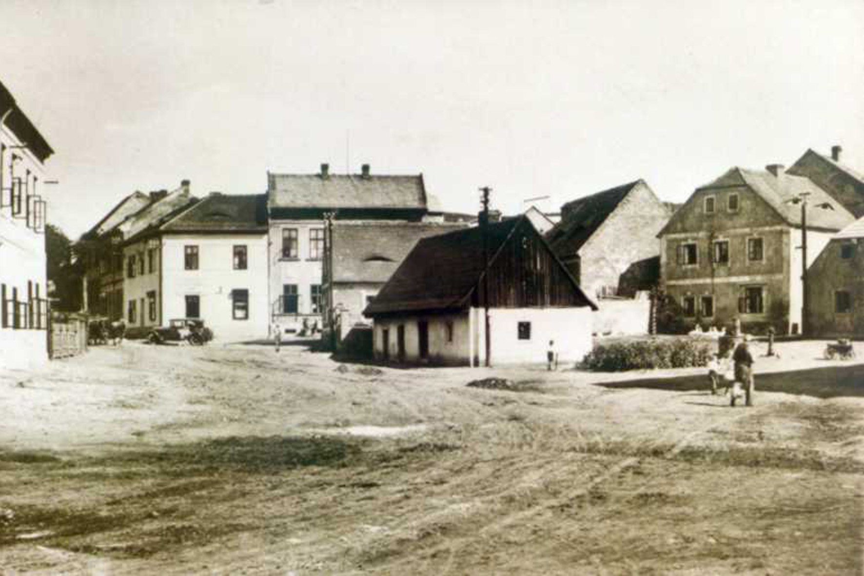 Dorf Dudolice nad Bílinou (Rudelsdorf an der Biela) bei Most (Brüx) in Tschechien